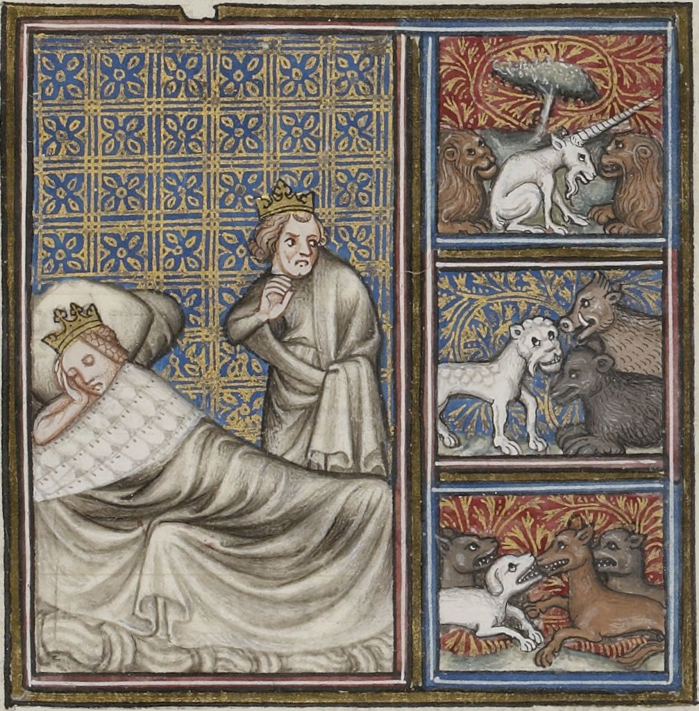 Visions de Childéric Ier et de la reine Basine. Enluminure des Grandes Chroniques de France, vers 1375-1380. Paris, Bibliothèque nationale de France, département des Manuscrits, Français 2813, folio 7 verso.